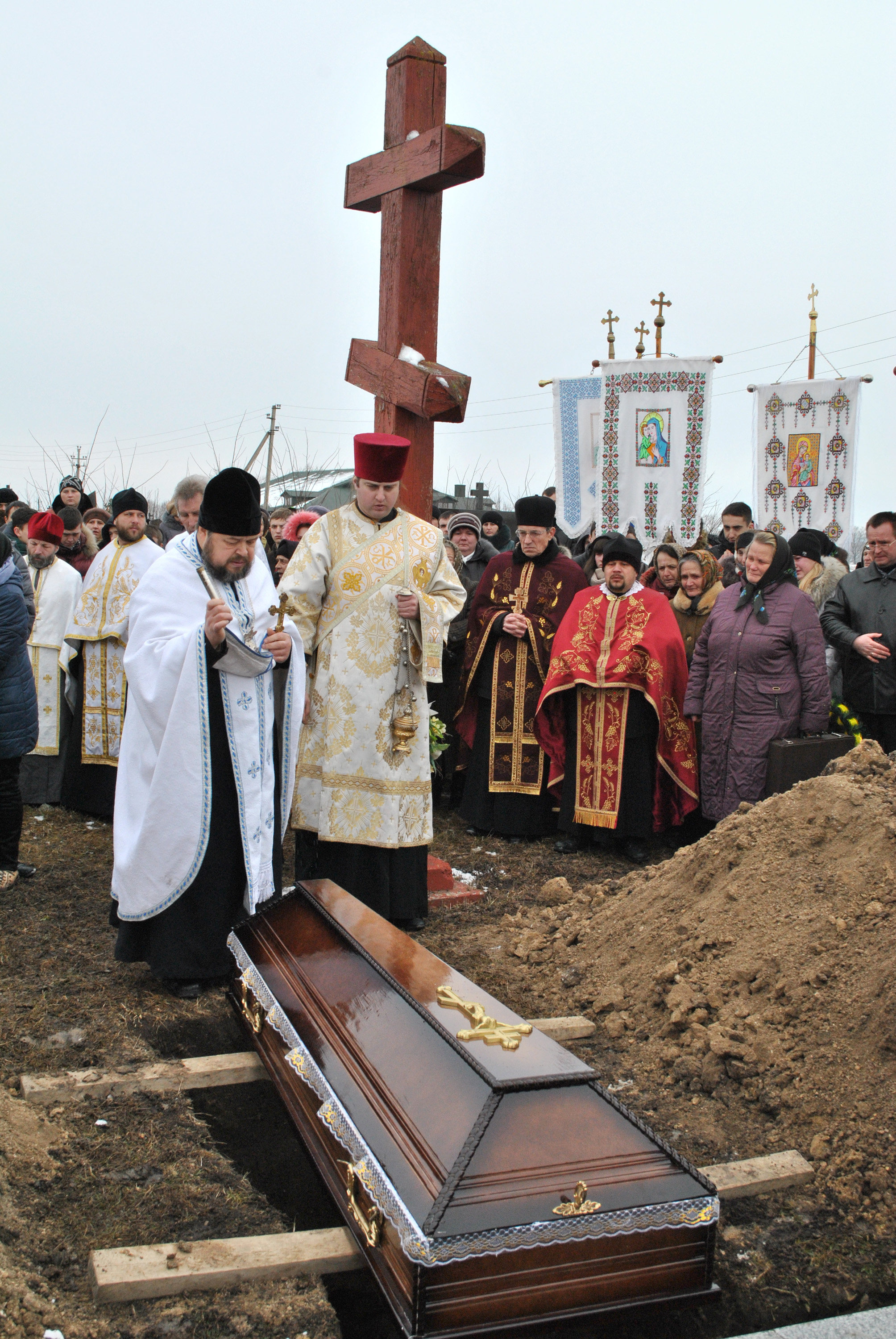 Похорон військовослужбовця 128-ї гірсько-піхотної бригади, уродженця с. Забойки Тернопільського району Тернопільської області Дмитра Заплітного на цвинтарі в його родинному селі 4 лютого 2015 року.